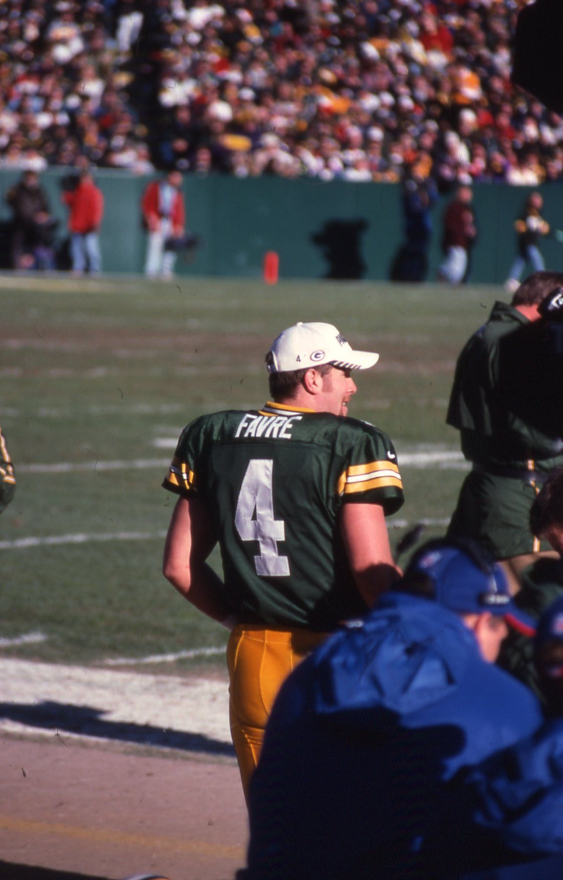 Brett Favre in a 1998 game.